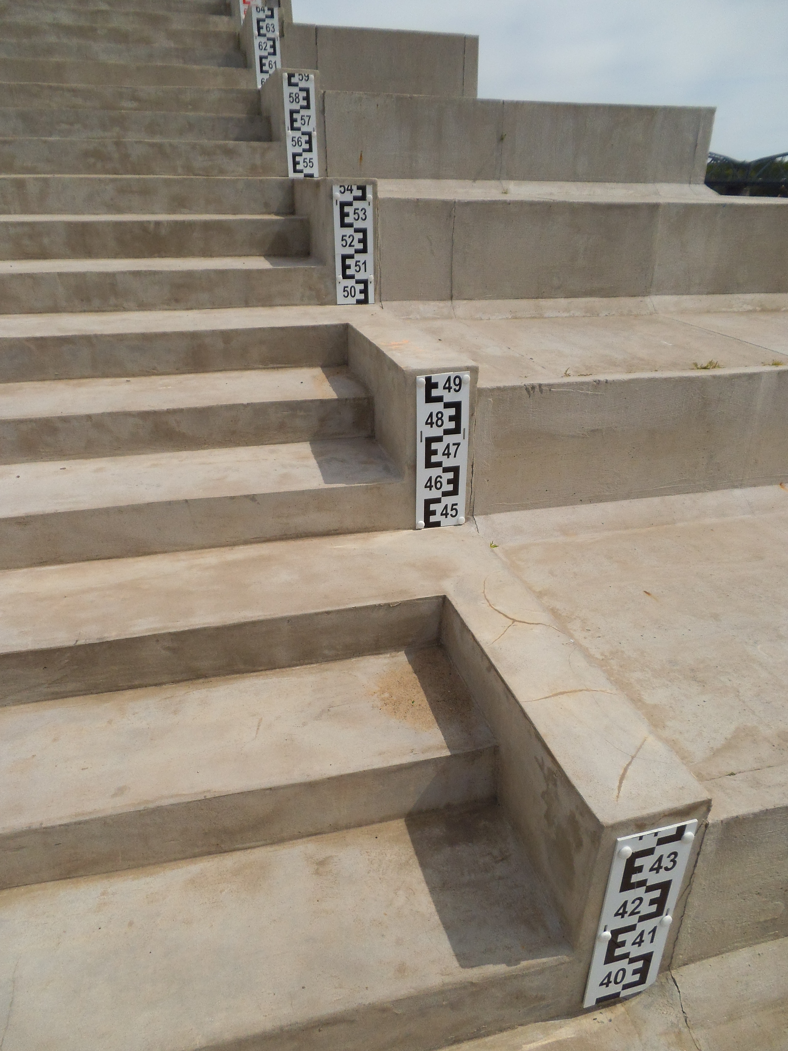 Wodowskaz na Wiśle w Toruniu.